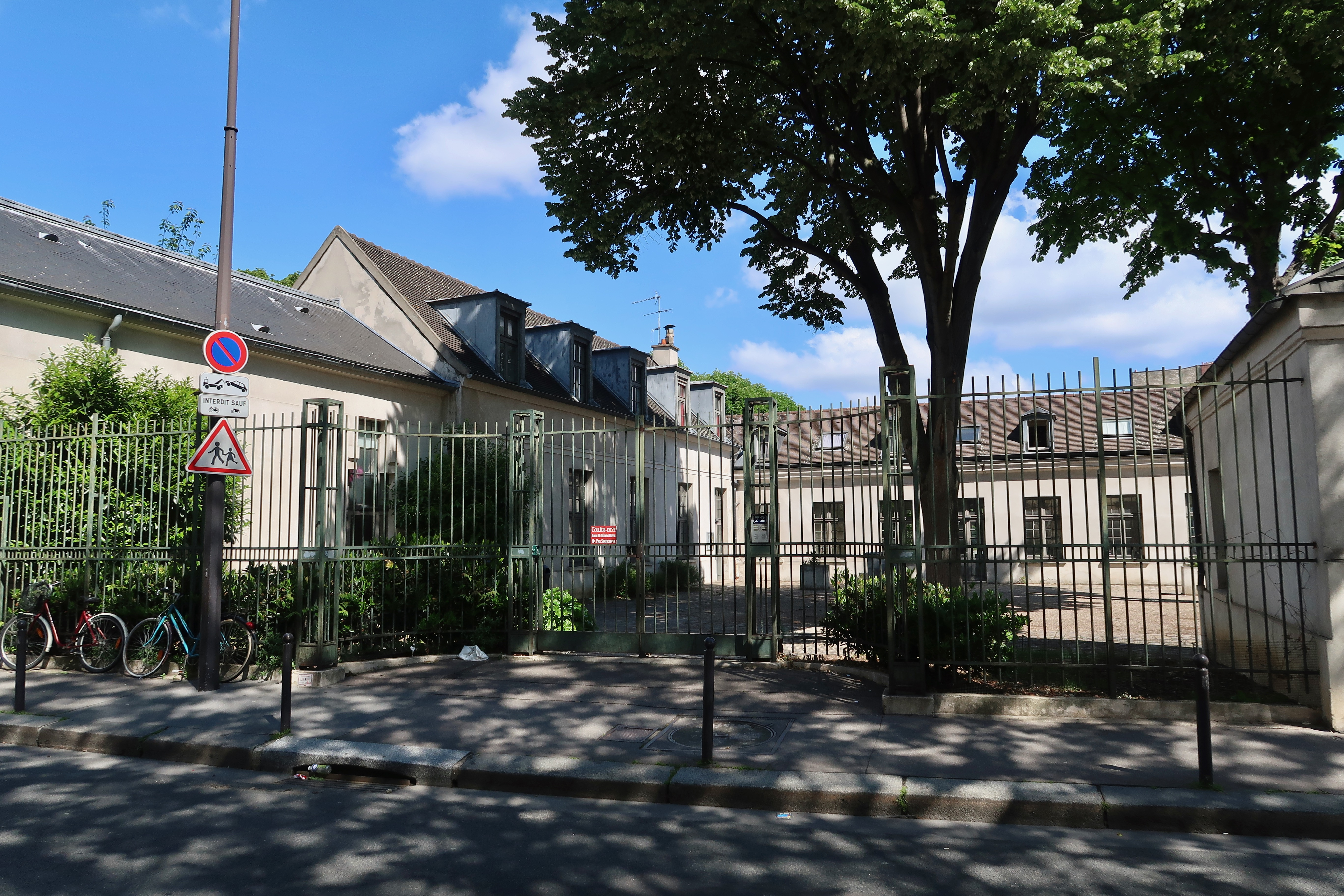 Entrée secondaire du lycée Victor-Duruy, 72 rue de Babylone (Paris, 7e).